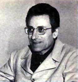 Foto di Paolo Maffei, astrofisico italiano.